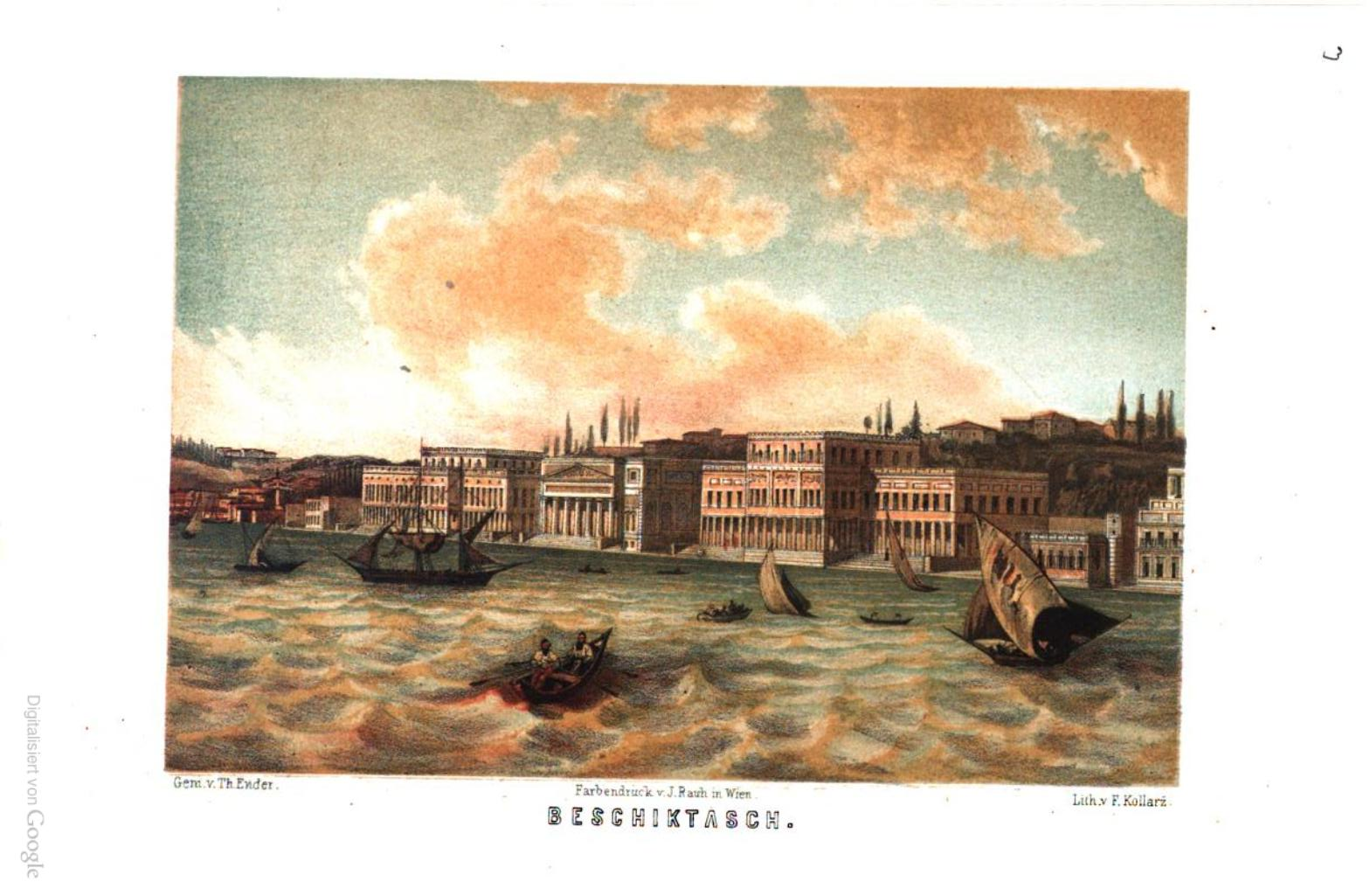 Ansicht von Beschiktasch um 1850